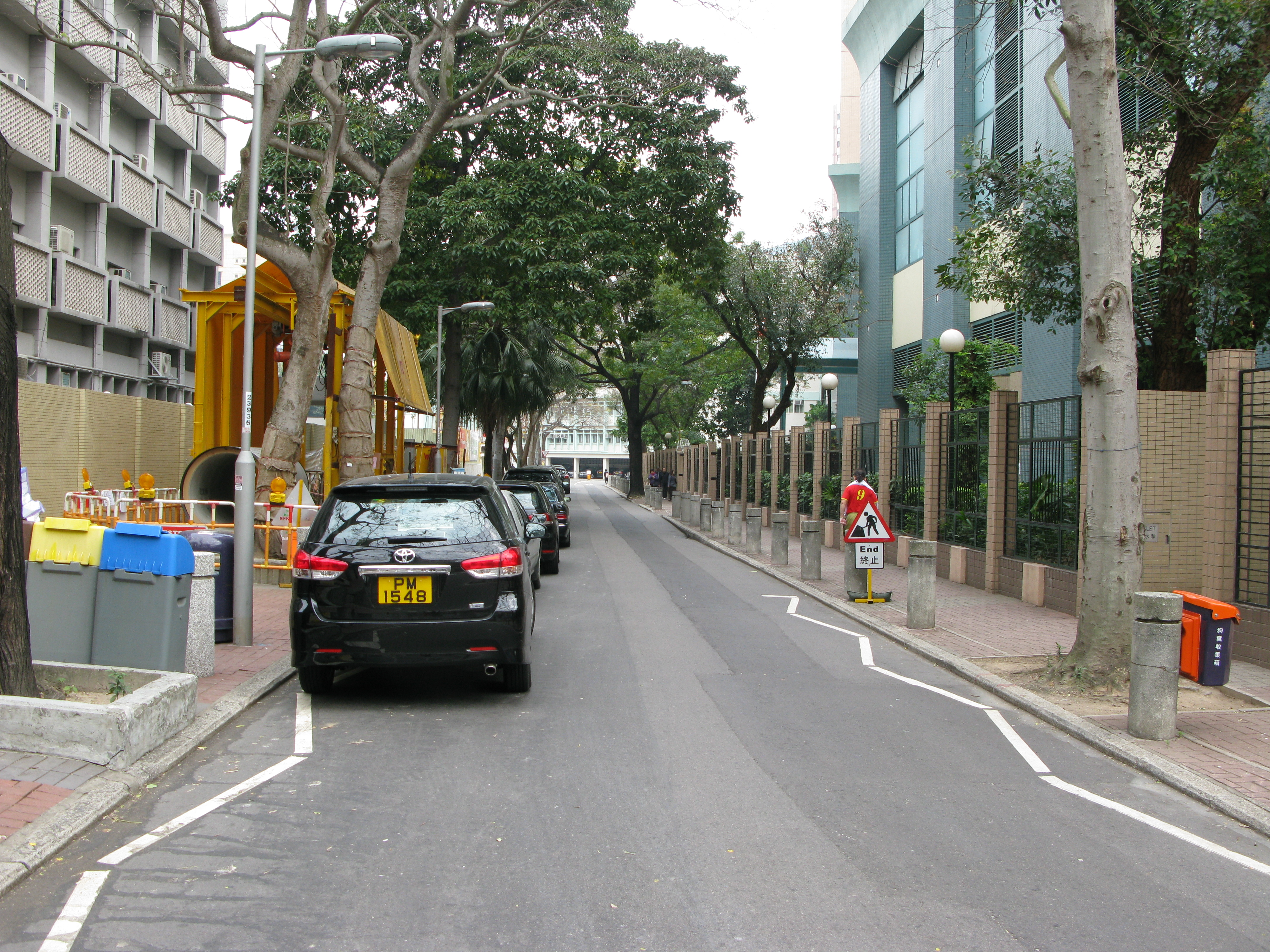 中文（香港）: 香港銅鑼灣棉花路日間一景。